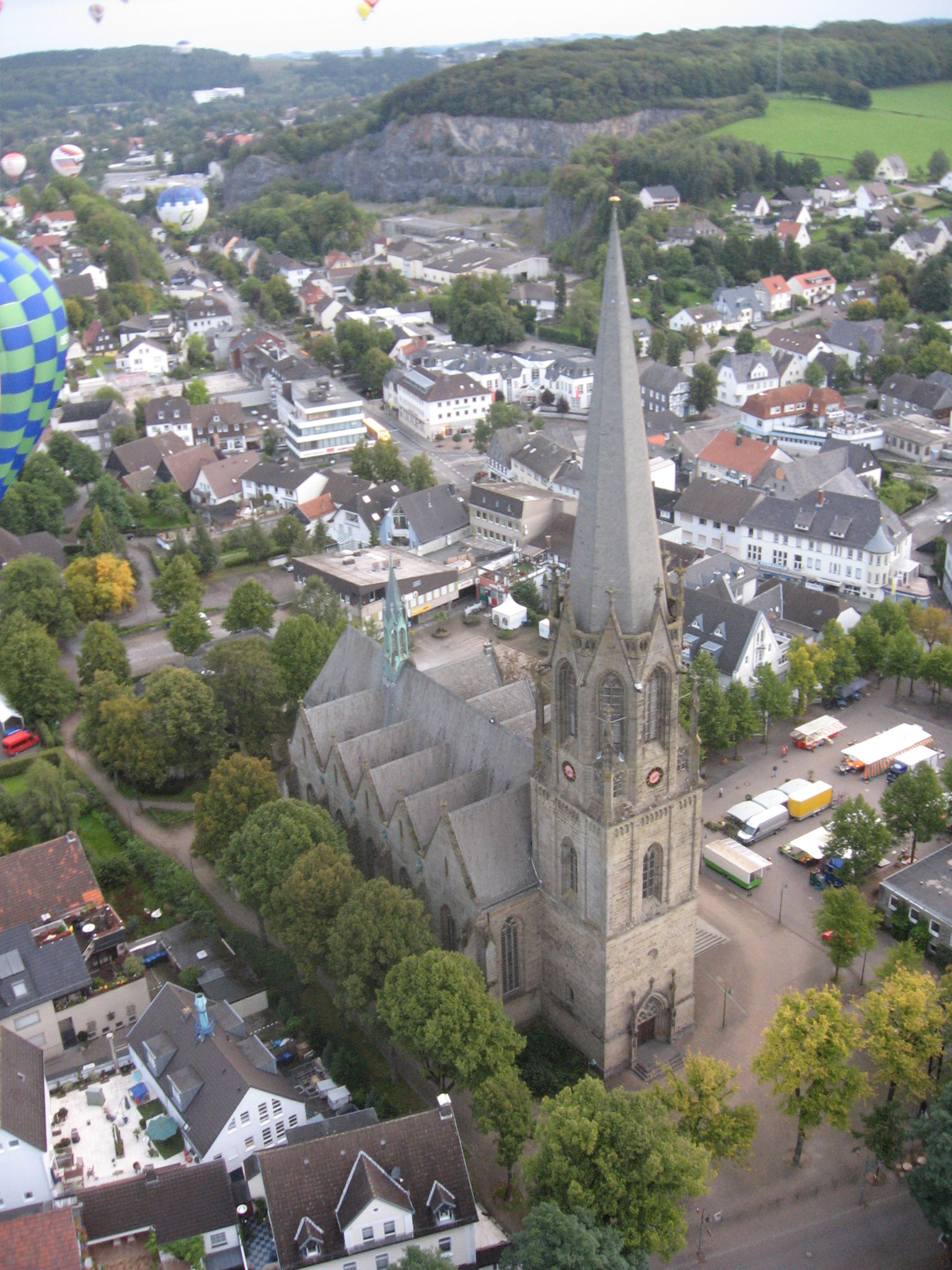 Die Kirche St. Pankratius in Warstein von einem Ballon aus aufgenommen.